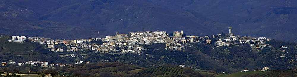 Panorama di Montalto Uffugo (CS)